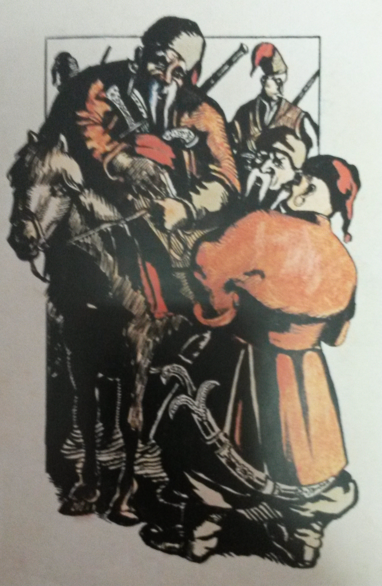 Ілюстрацыя да аповесці М. В. Гогаля "Тарас Бульба". Прыезд Бульбы ў Сеч